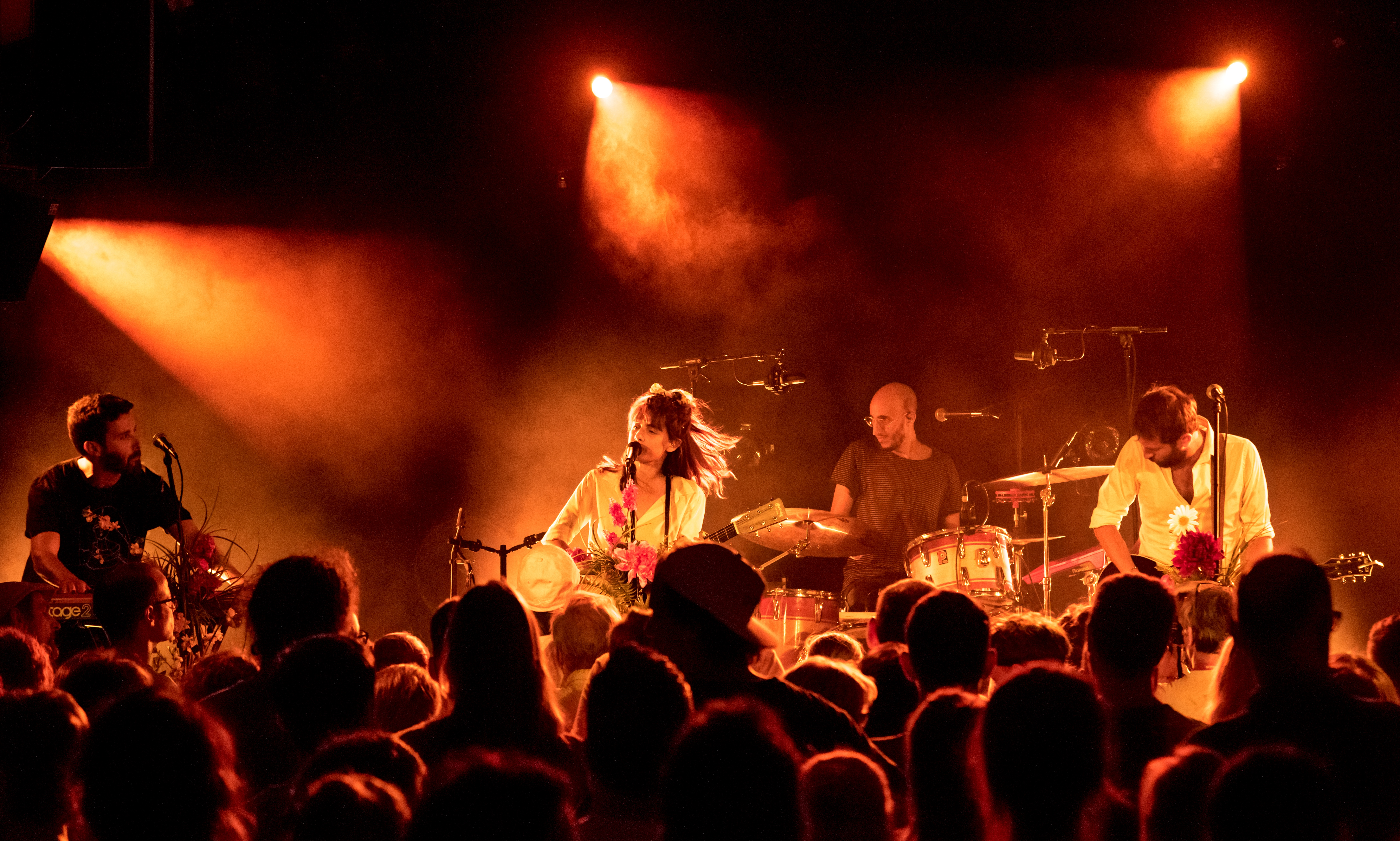 Bilder vom Zelt Musik Festival 2018 in Freiburg im Breisgau Lola Marsh am 1. August 2018 im Spiegelzelt